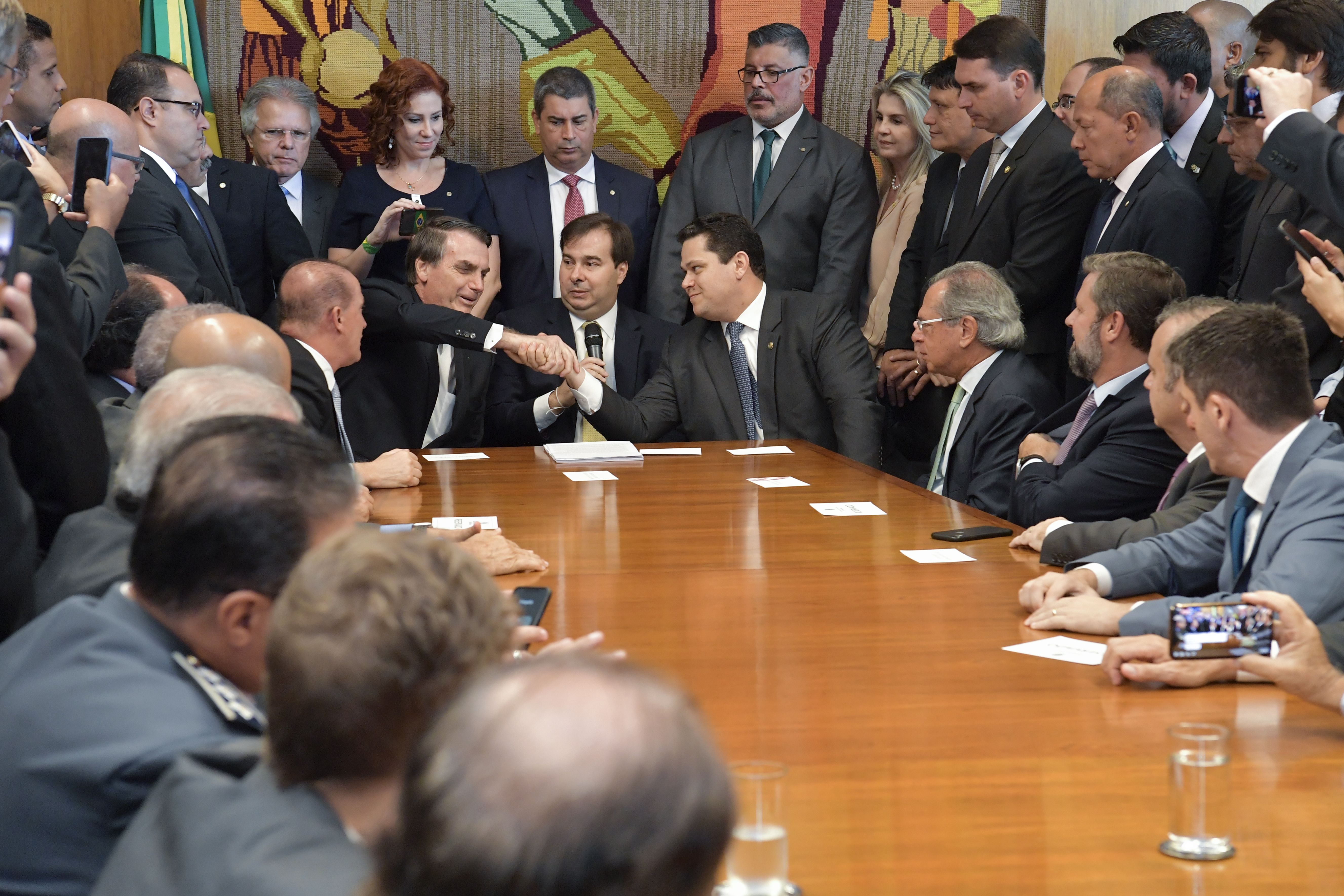 Presidentes do Senado e da Câmara recebem de Jair Bolsonaro a reforma da Previdência. Participam: ministro da Economia, Paulo Guedes; presidente da Câmara dos deputados, deputado Rodrigo Maia (DEM-RJ); presidente do Senado Federal, senador Davi Alcolumbre (DEM-AP); deputado Alexandre Frota (PSL-SP); ministro-chefe da Casa Civil, Onyx Lorenzoni; senador, Flávio Bolsonaro (PSL-RJ); presidente da República, Jair Bolsonaro. Foto: Marcos Brandão/Senado Federal